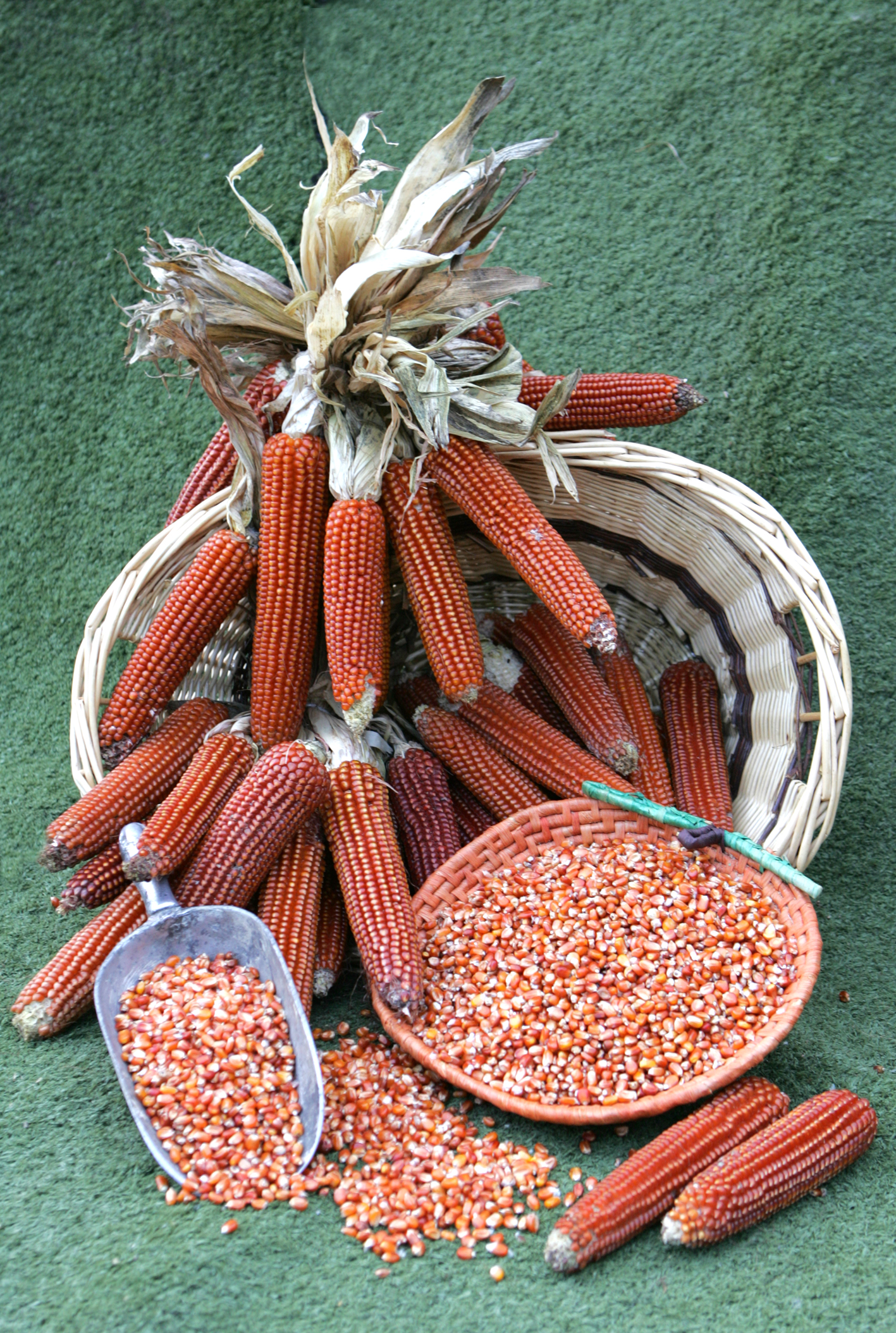 Cesto di Pignoletto Rosso Canavesano